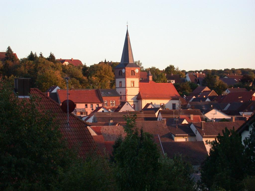 Aufnahme des Ortskerns von Neubrunn.